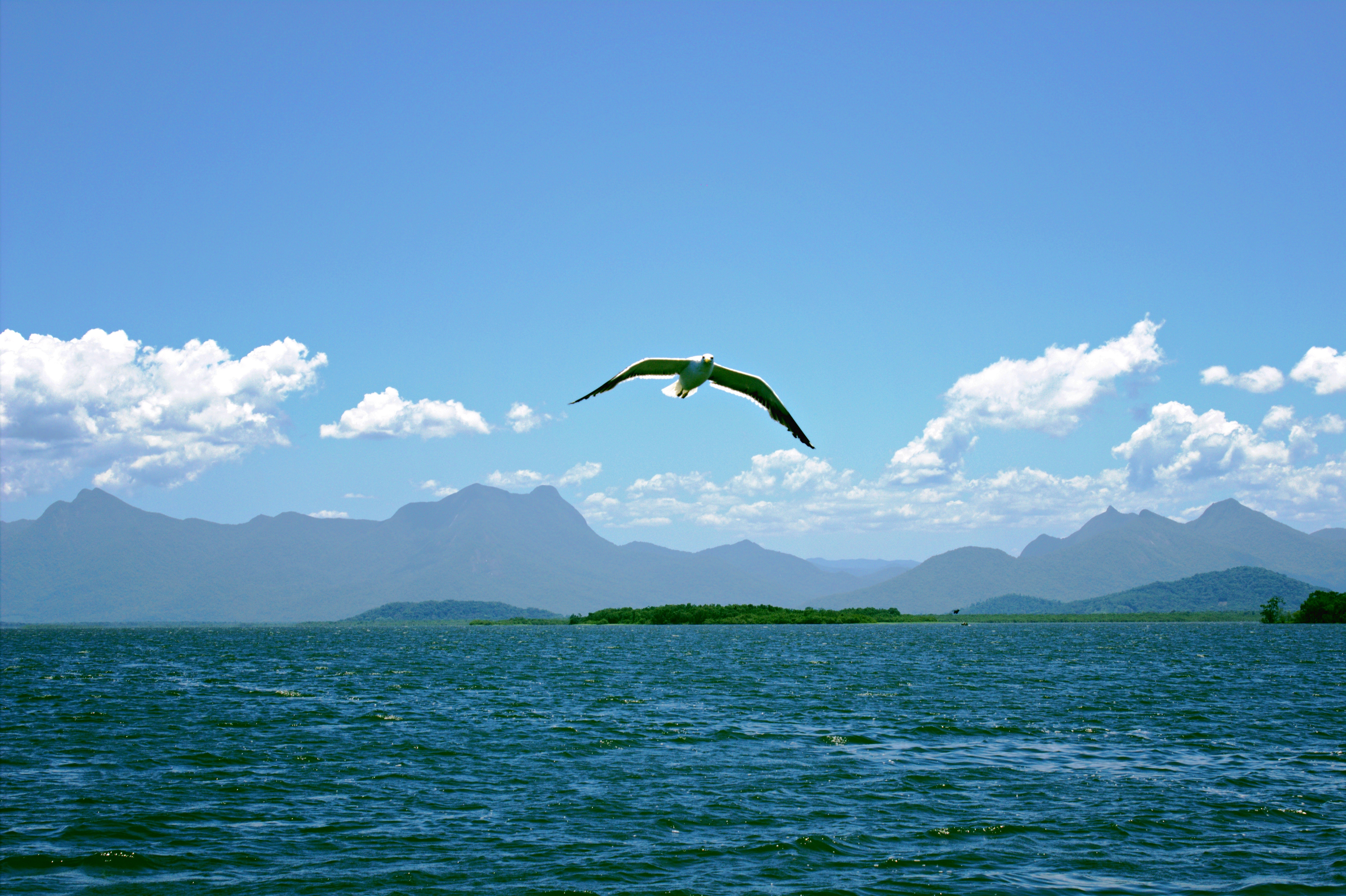 Fotografia tirada na baía de Guaratuba com vista para dois parques nacionais: Saint-Hilaire/Lange (a oeste, ou seja no lado direito da foto) e o Guaricana (a norte; ao fundo). Como se já não bastasse a imagem traz também uma das aves mais presentes na região: a Gaivota.